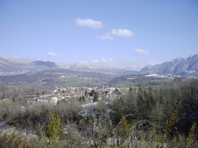 Yenne vu depuis Notre-Dame de la Montagne. Auteur: Jean-Marc Watier.(Yvounet)